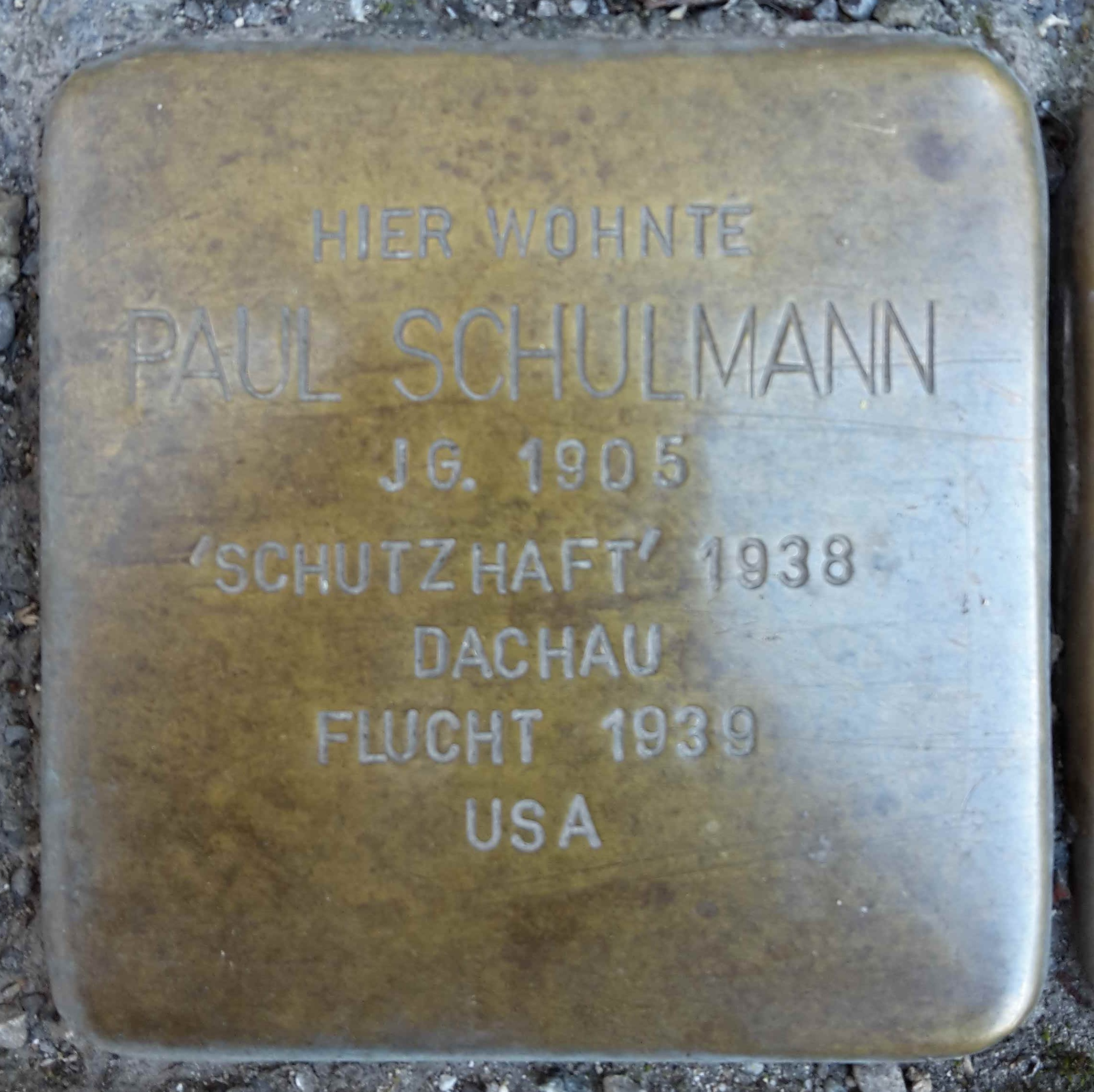 Stolperstein für Paul Schulmann